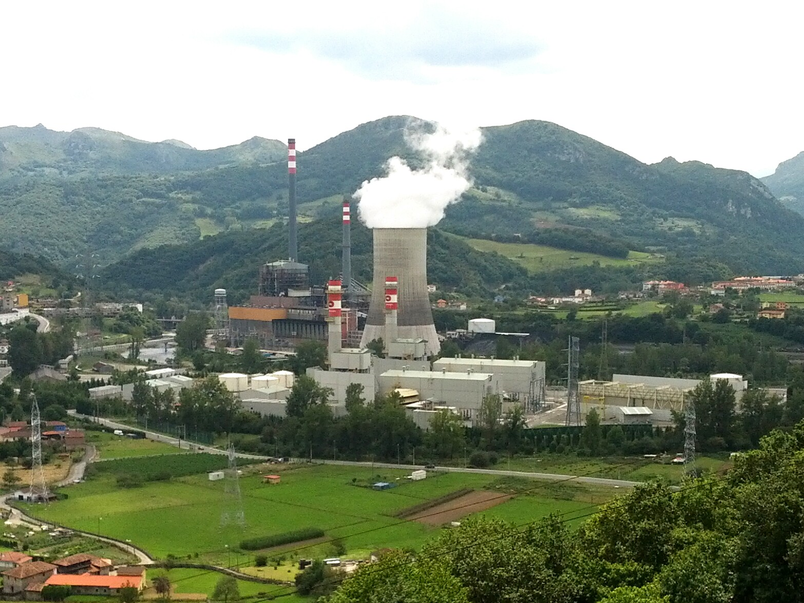 Centrales térmica de carbón y de ciclo combinado en Soto Ribera (Asturias), España